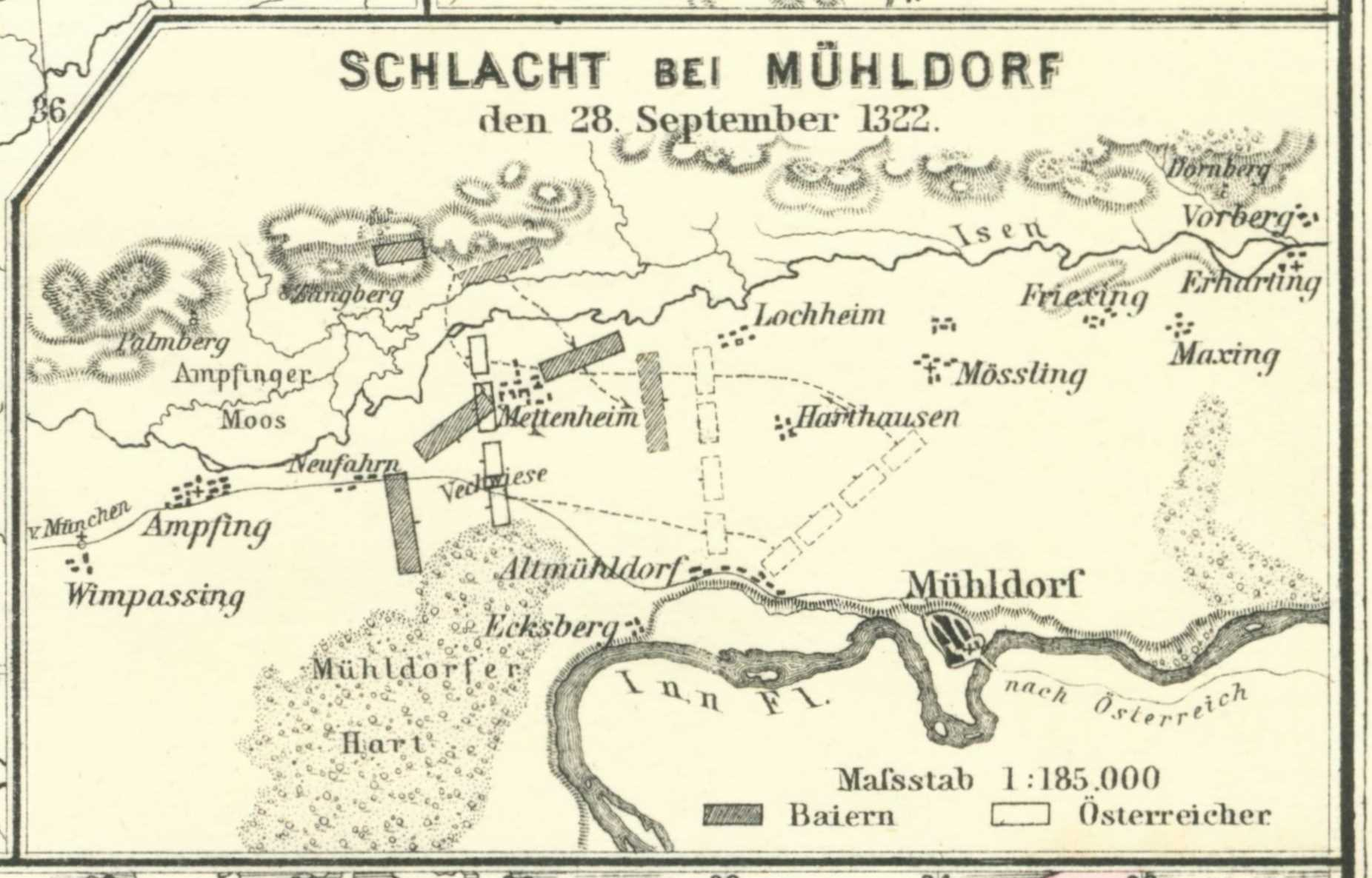 Schlacht bei Mühldorf den 28. September 1322